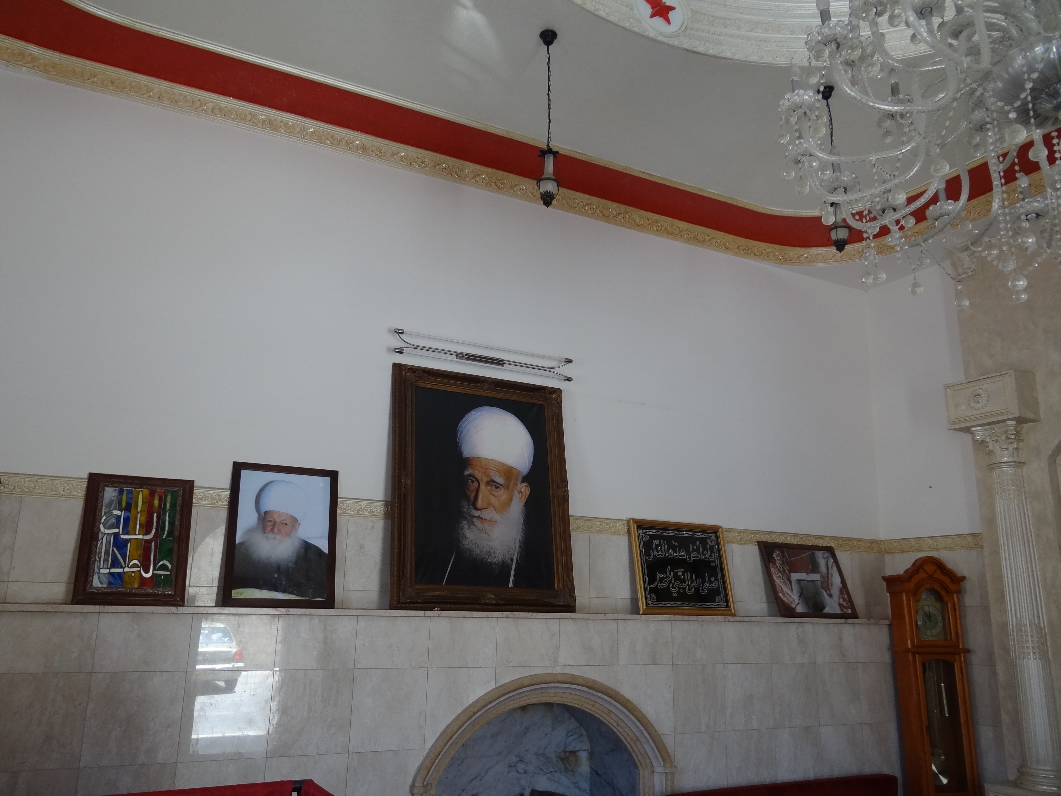 מקאם הנביא אבו אברהים (מקאם=אתר), הוא אתר דתי השוכן בדאלית אל-כרמל בשכונה המערבית לא רחוק מהמרכז הישן של היישוב תמונתו של שייח' אמין טריף בתוך המבנה מעל המערה